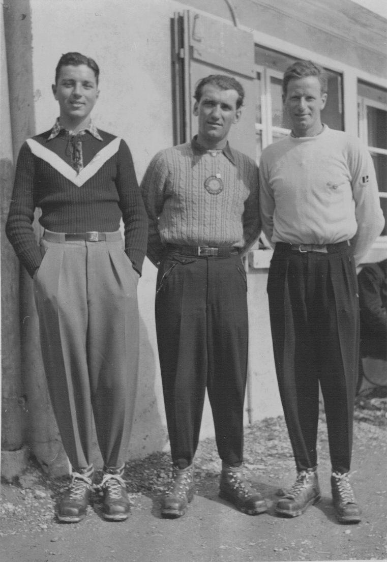 Prominente Teilnehmer am Titlis Riesenslalom 1939: Gerold Berchtold (links), Rudolf Rominger (mitte), Hans Matter (rechts